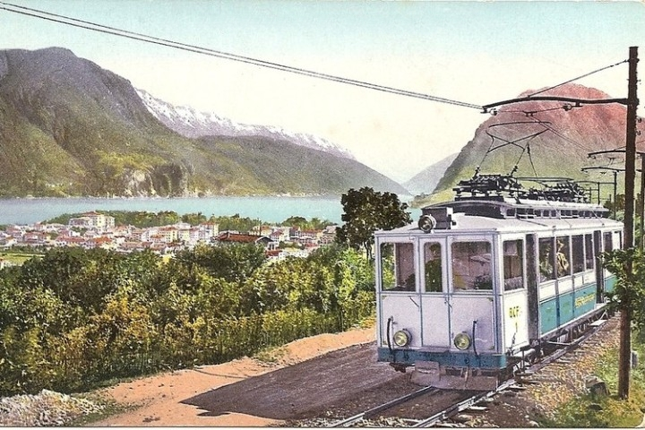 Motorwagen BCFe 4/4 Serie 1-3 der Lugano–Tesserete-Bahn (LT) mit Laternendach zum Zeitpunkt der Betriebseröffnung etwa 1910